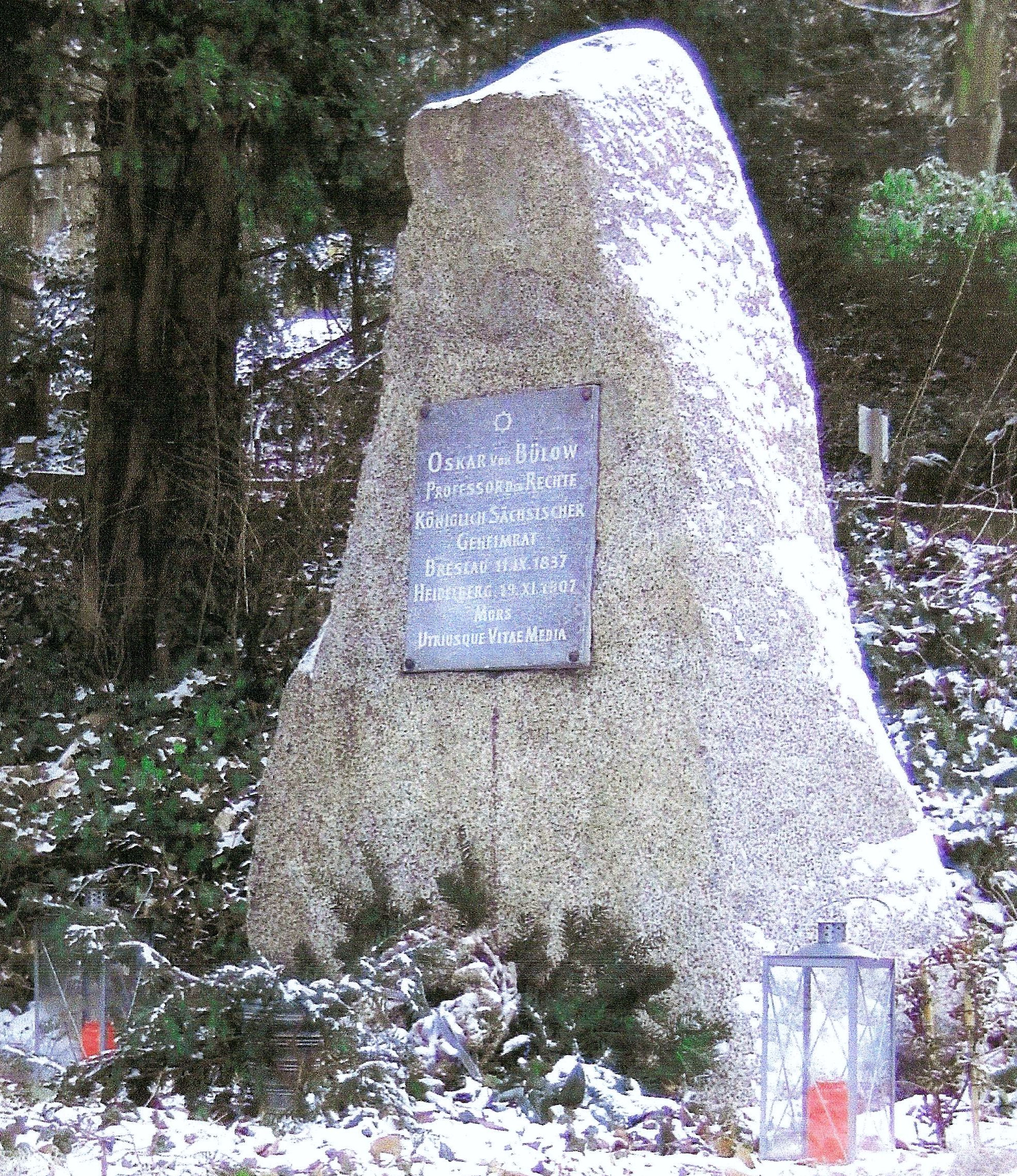 Grab von Oskar von Bülow auf dem Heidelberger Bergfriedhof